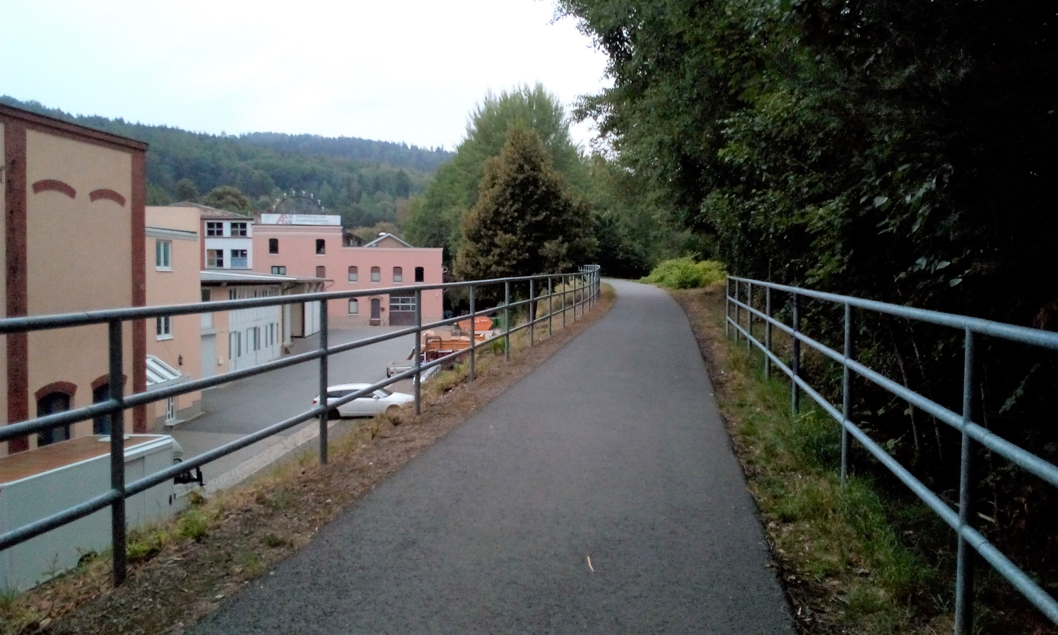 Auerhammer Ladestelle (2018)